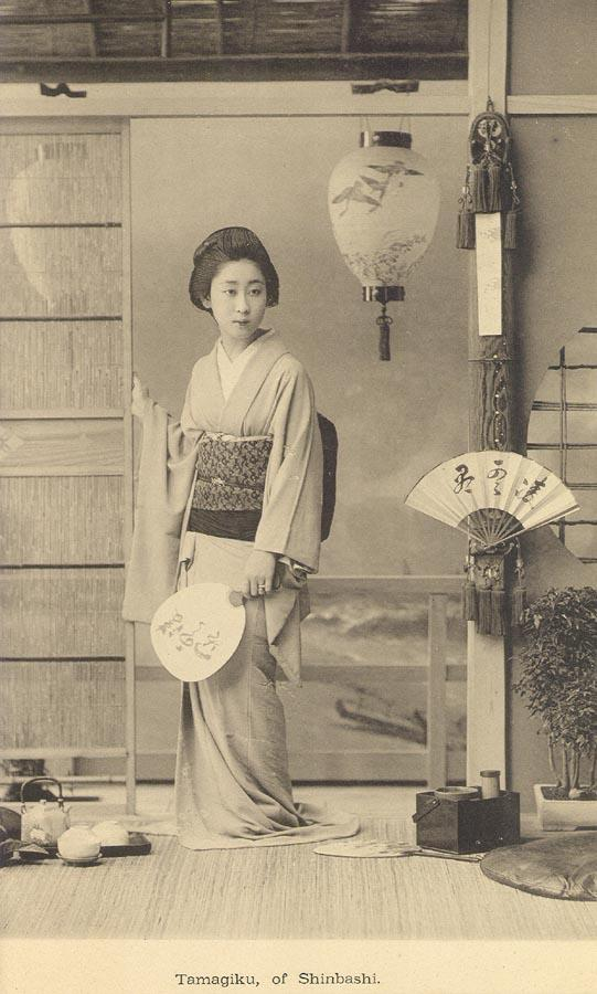 Celebrated Geysha (Geisha) of Tokyo Kazumasa Ogawa, cca 1892 V roce 1891 pořídil Ogawa 100 snímků nejatraktivnějších tokijských gejš u příležitosti oslav otevření mrakodrapu Ryōunkaku.